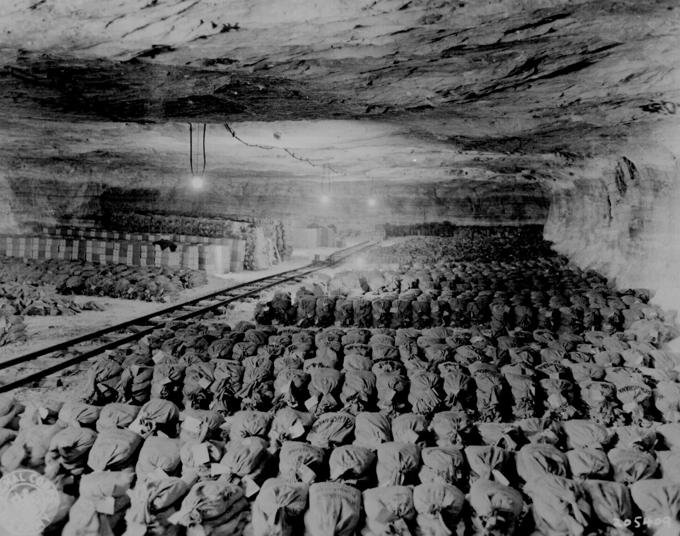 US-Soldaten der 90. Division entdecken am 15. April 1945 im Salzbergwerk die Reichtümer der Reichsbank, die Beuteschätze der SS und Gemälde aus dem Berliner Museum.